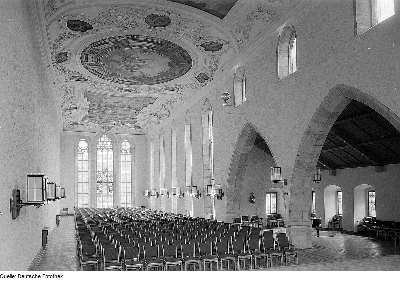 Original image description from the Deutsche Fotothek Saalfeld. Stadtmuseum im Franziskanerkloster, Festsaal mit Barockdecke